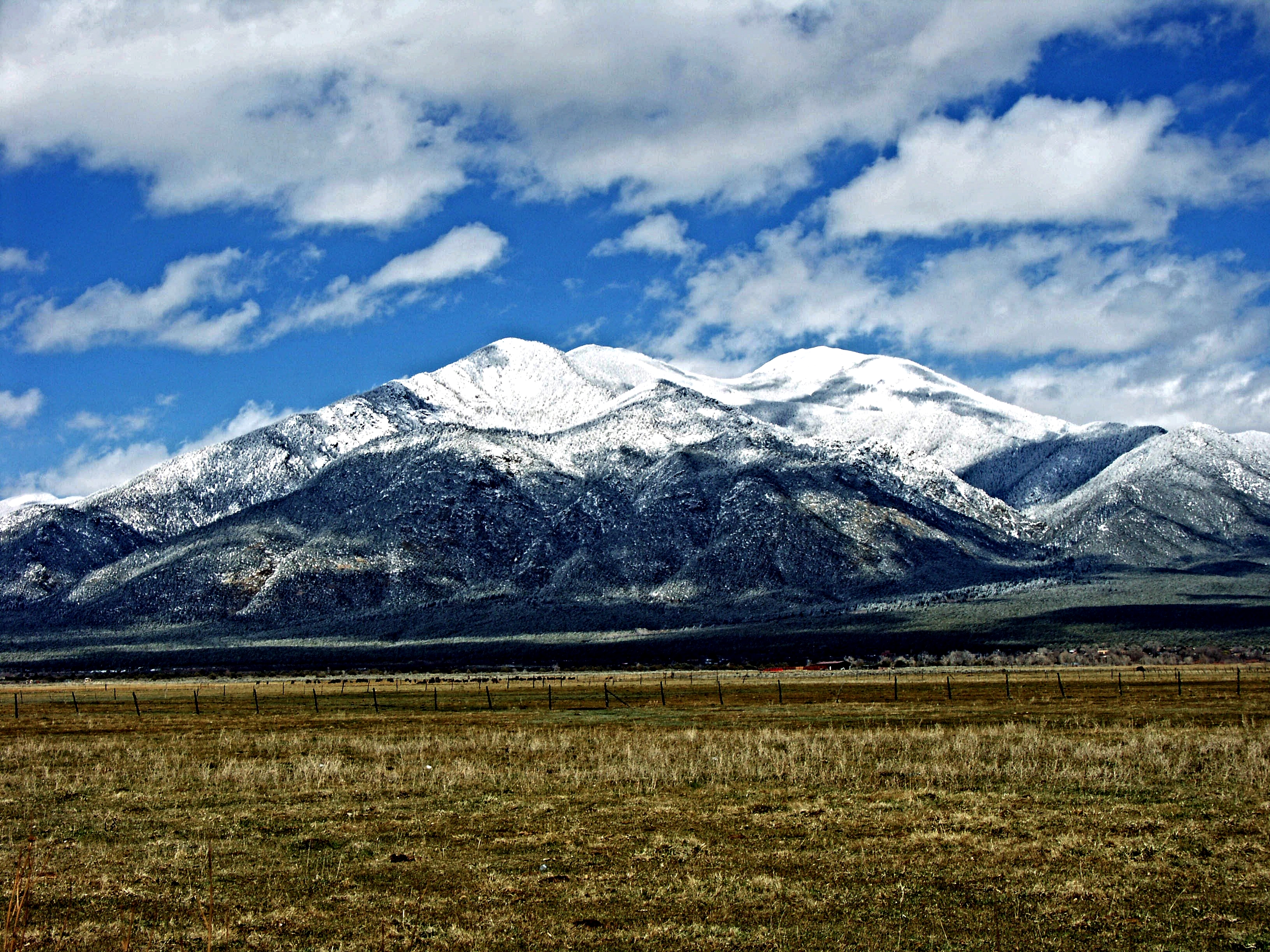 El Prado,New Mexico